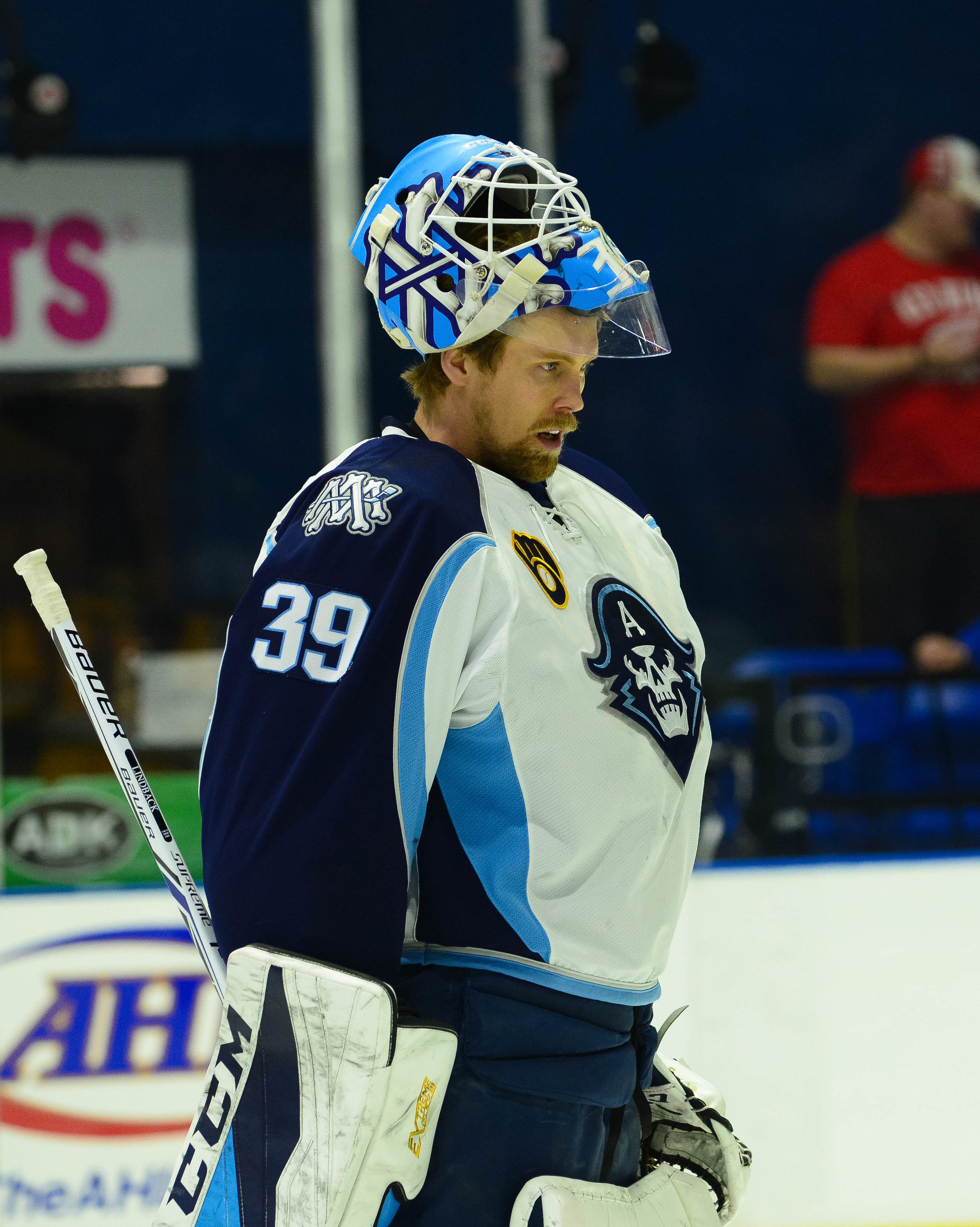 (Bryan Peck/ AHL)